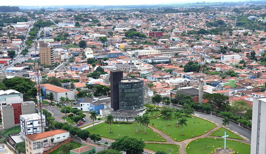 Panorama de Mogi Guaçu/SP -Brasil